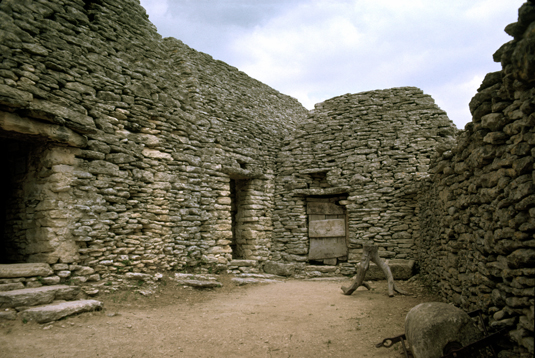 Les Savournins Bas, alias le "Village des Bories", à Gordes, (Vaucluse), groupe de bâtiments No 4 de la classification de Pierre Viala (No 6 dans la classification de Christian Lassure) : distribués d'ouest en est, autour d'une courette, et s'appuyant les unes sur les autres, une habitation magnanerie, une étable-bergerie et une resserre (de gauche à droite).